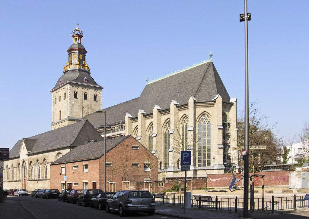 Köln, St. Ursula, von Osten. Der Bildtitel gibt die falsche Himmelsrichtung an.